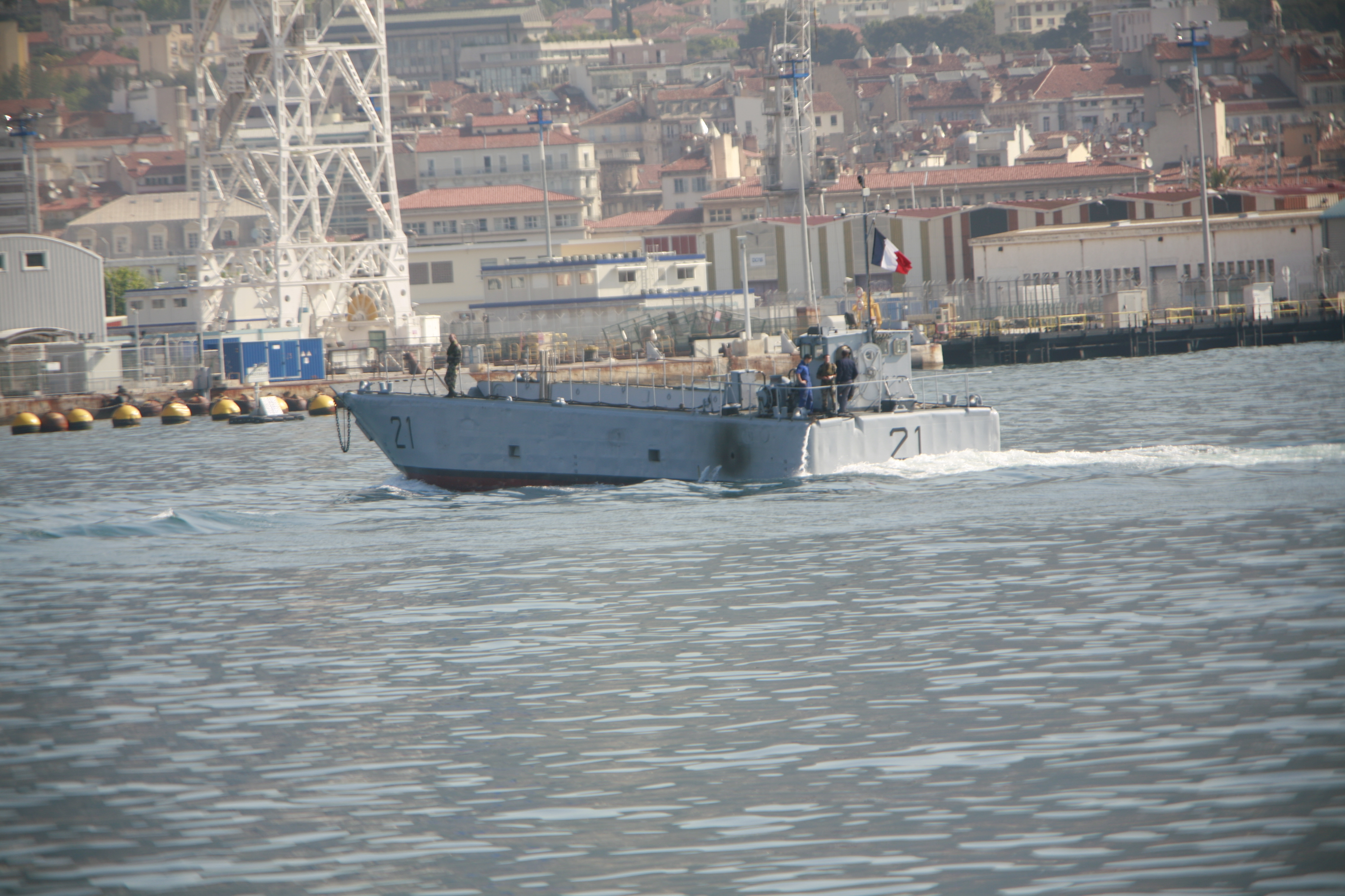 Chaland de transport de matériel ("equipment transport barge") in Toulon harbour